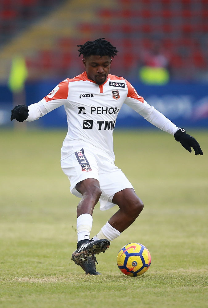 ЦСКА- "Урал". 03.03.2018